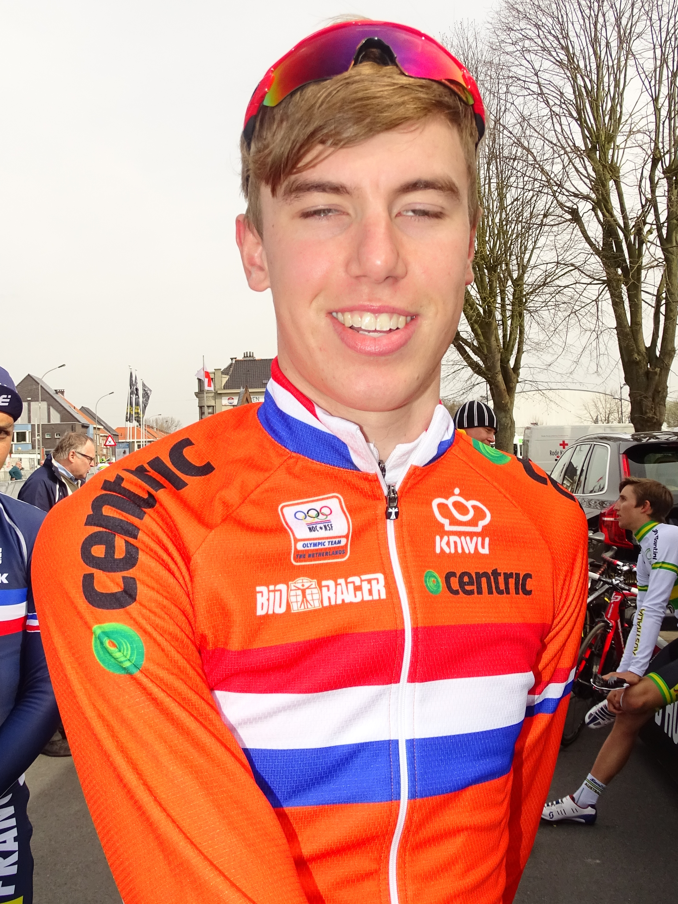 Reportage réalisé le samedi 9 avril à l'occasion du départ et de l'arrivée du Tour des Flandres espoirs 2016 à Audenarde, Belgique.